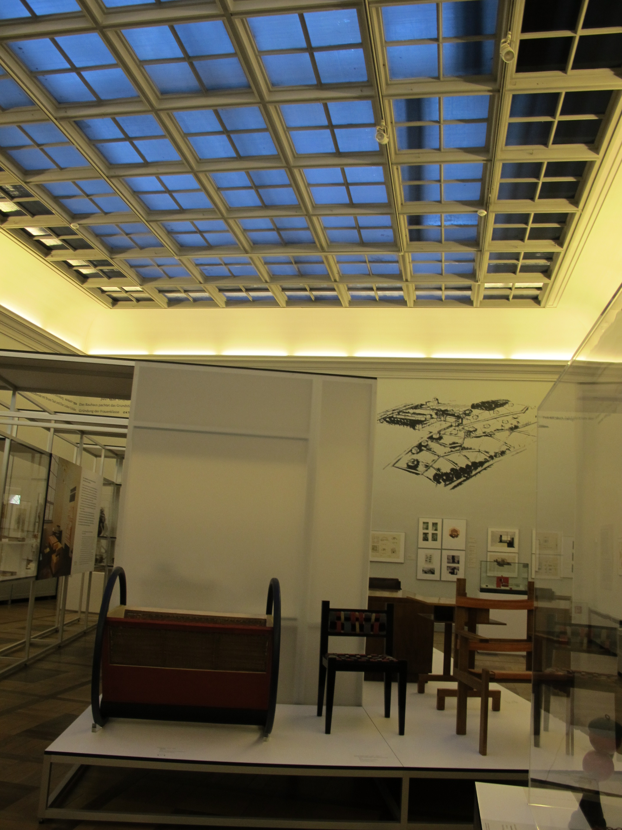 Bauhaus Museum Weimar